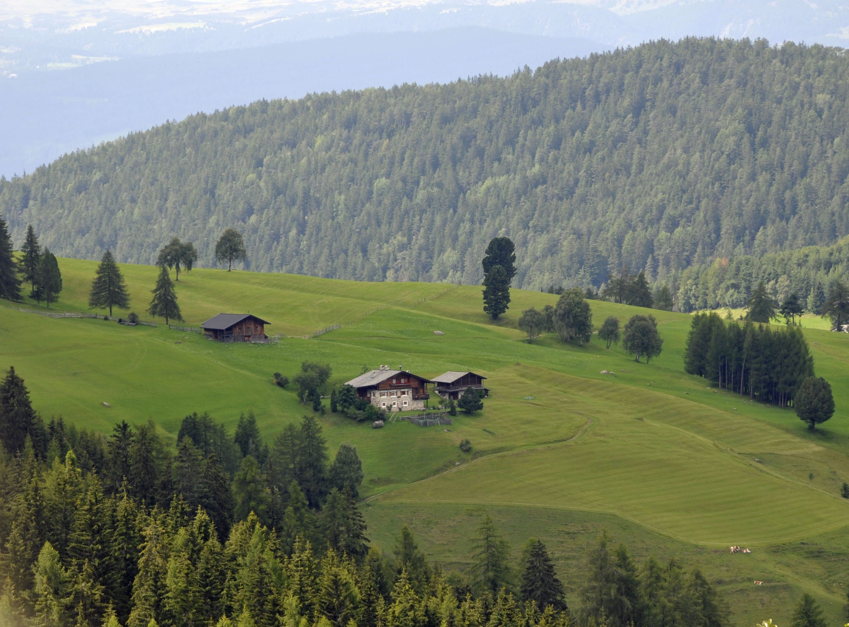 Il maso Roveis a Bulla, Passo Pinëi donde origina la famiglia del pittore Valentino Rovisi